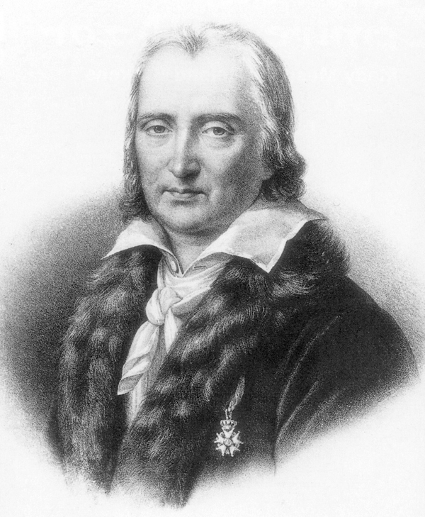 André Ernest Modeste Grétry (1741-1813) wearing the Légion d'Honneur medal